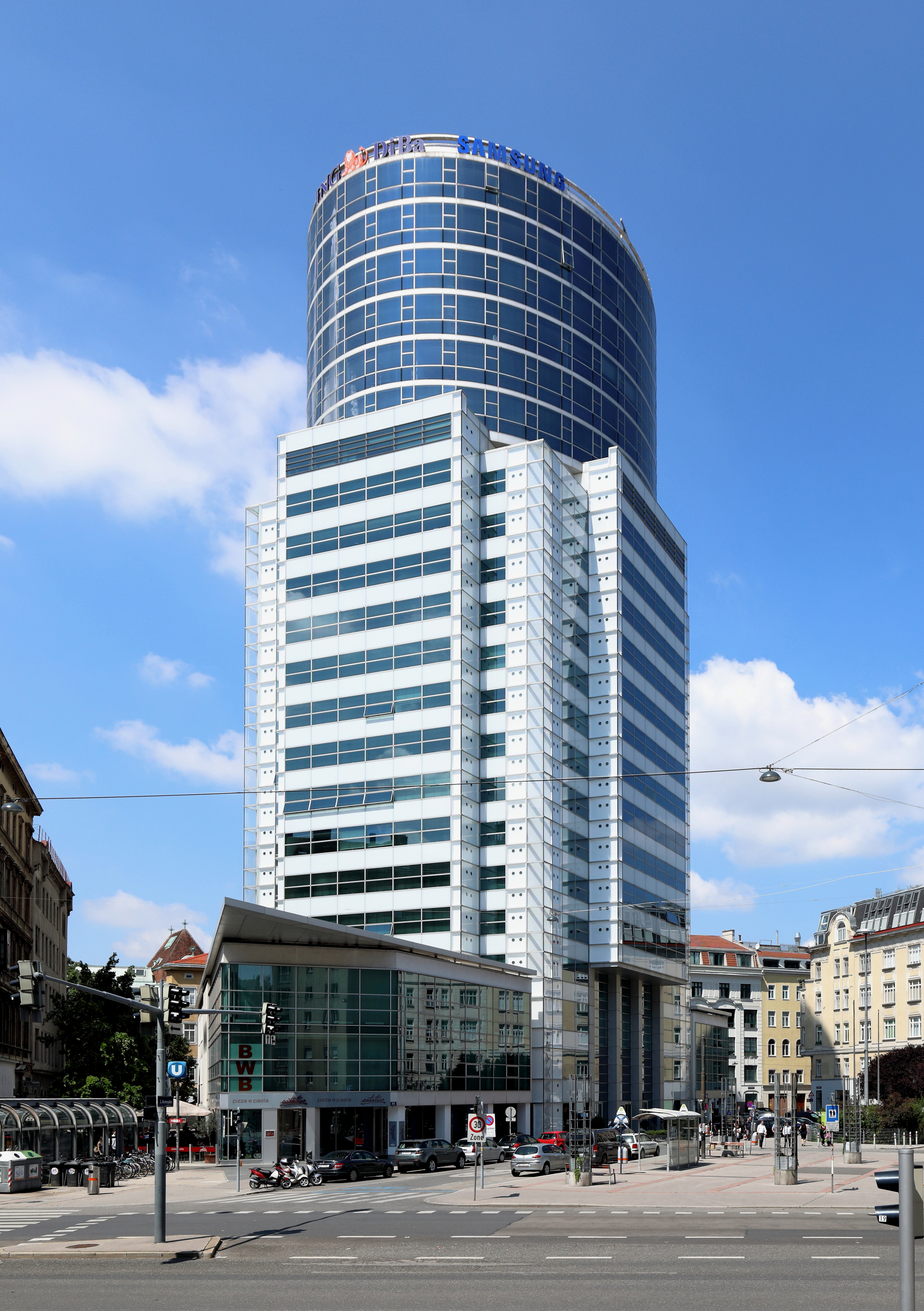 Südostansicht des Galaxy Towers, auch als „Galaxy 21“ bezeichnet, an der Adresse Praterstraße 31 (Komödiengasse 5, Zirkusgasse 12-14, Schrottgießergasse) im 2. Wiener Gemeindebezirk Leopoldstadt.Das Bürohochhaus mit der ursprünglichen Bezeichnung „Galaxie“ wurde von 1974 bis 1978 nach Plänen von Josef Becvar (1907–1984) und Herbert Neuroth (1925–2007) errichtet. In Verantwortung des Architekten Martin Kohlbauer erfolgte von 2001 bis 2002 eine Aufstockung des zentralen Turms sowie eine Generalsanierung mit einer Fassadenveränderung.